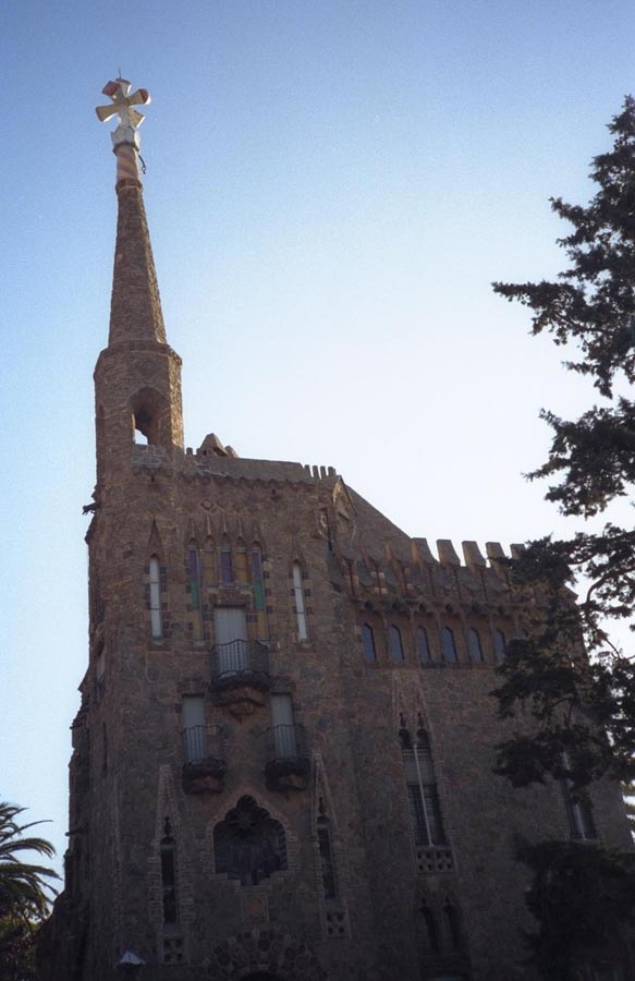 Bellesguard Photographer Isabelle Grosjean ZA Date 1995-03 License GNU FDL Camera Minolta Dynax 500si